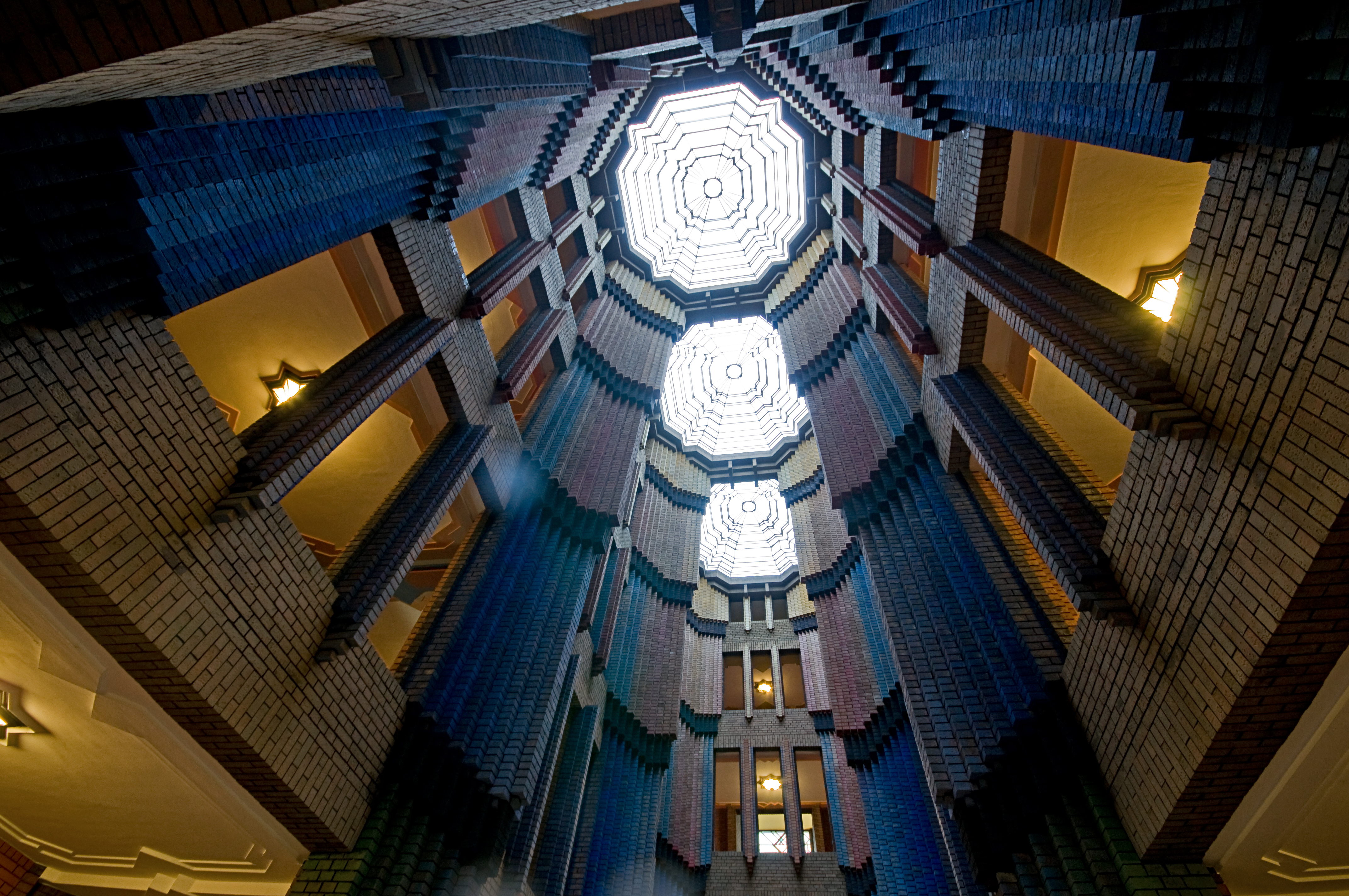 Industriepark HöchstBehrensbau: Eingangshalle